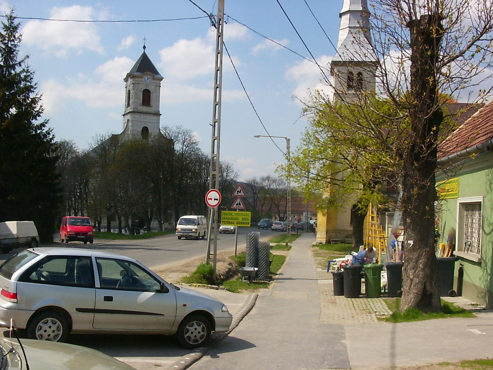 Piliscsaba főutcája (10-es főút)